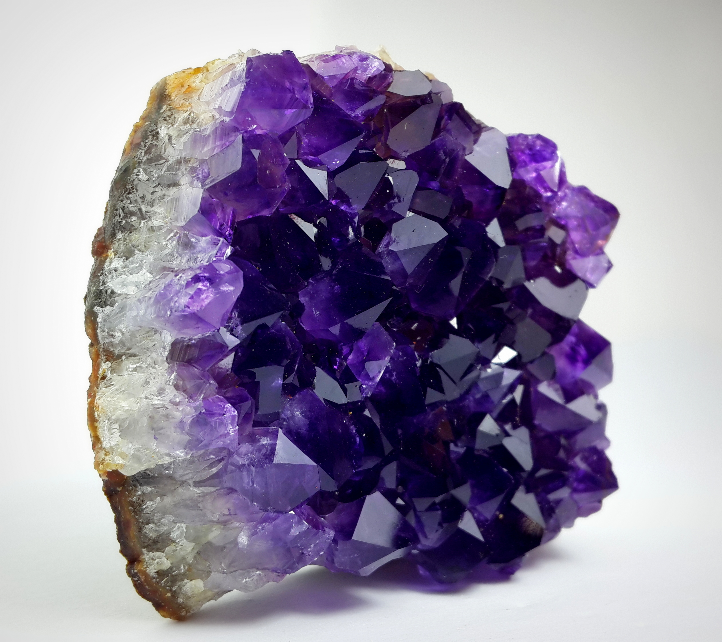 Amatista Laye Extraída de Catalán, Artigas Uruguay